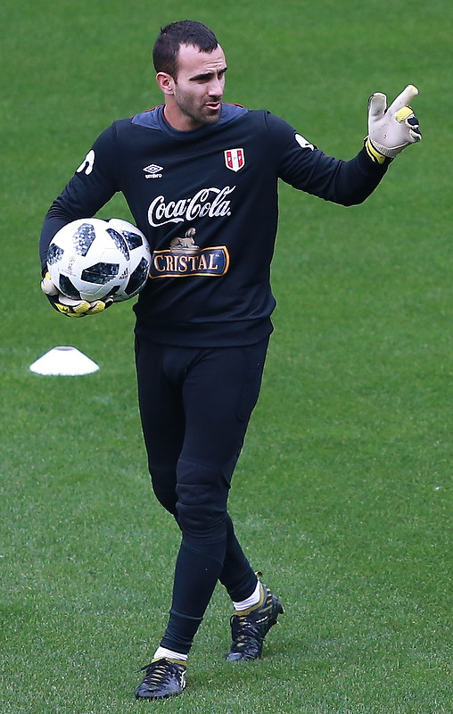 Сборная Перу с Фарфаном провела открытую тренировку в Химках